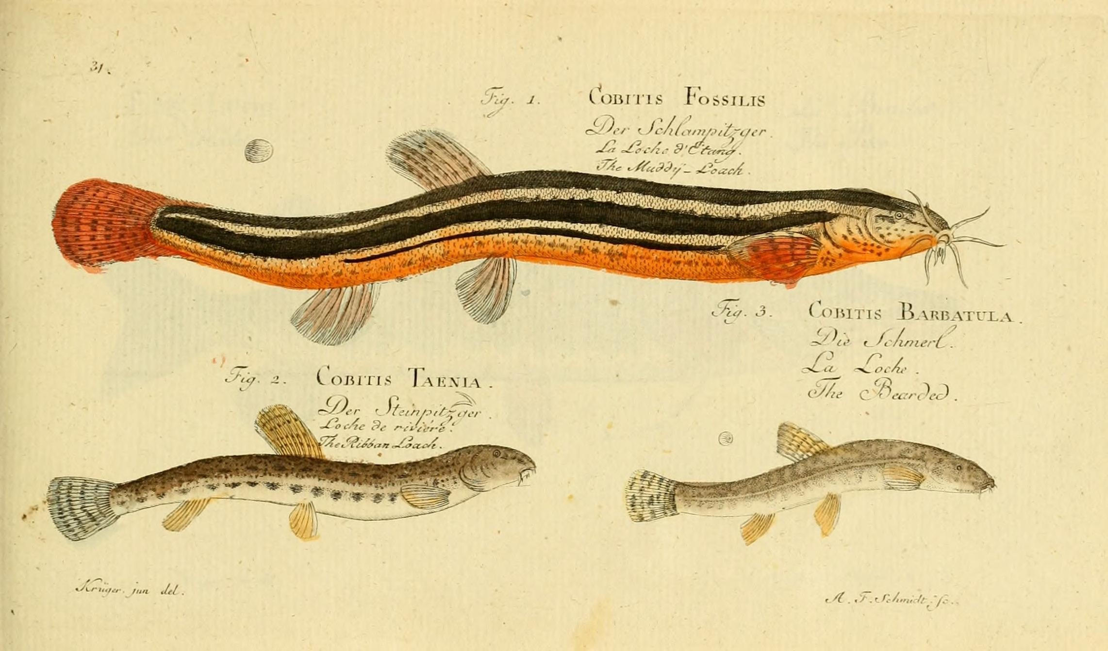 "/. - COBITIS FoSSlLIS cV./. i? . ^/. 3. C OBI US